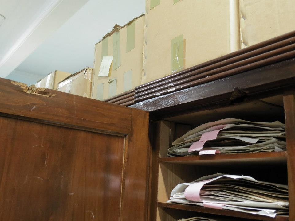 中文（台灣）: 國立臺灣大學植物標本館（木櫃破損）